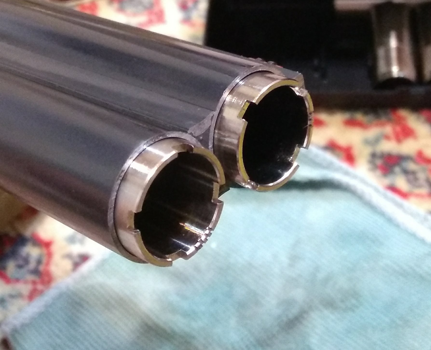 چوک متغییر دولول ساچمه زنی